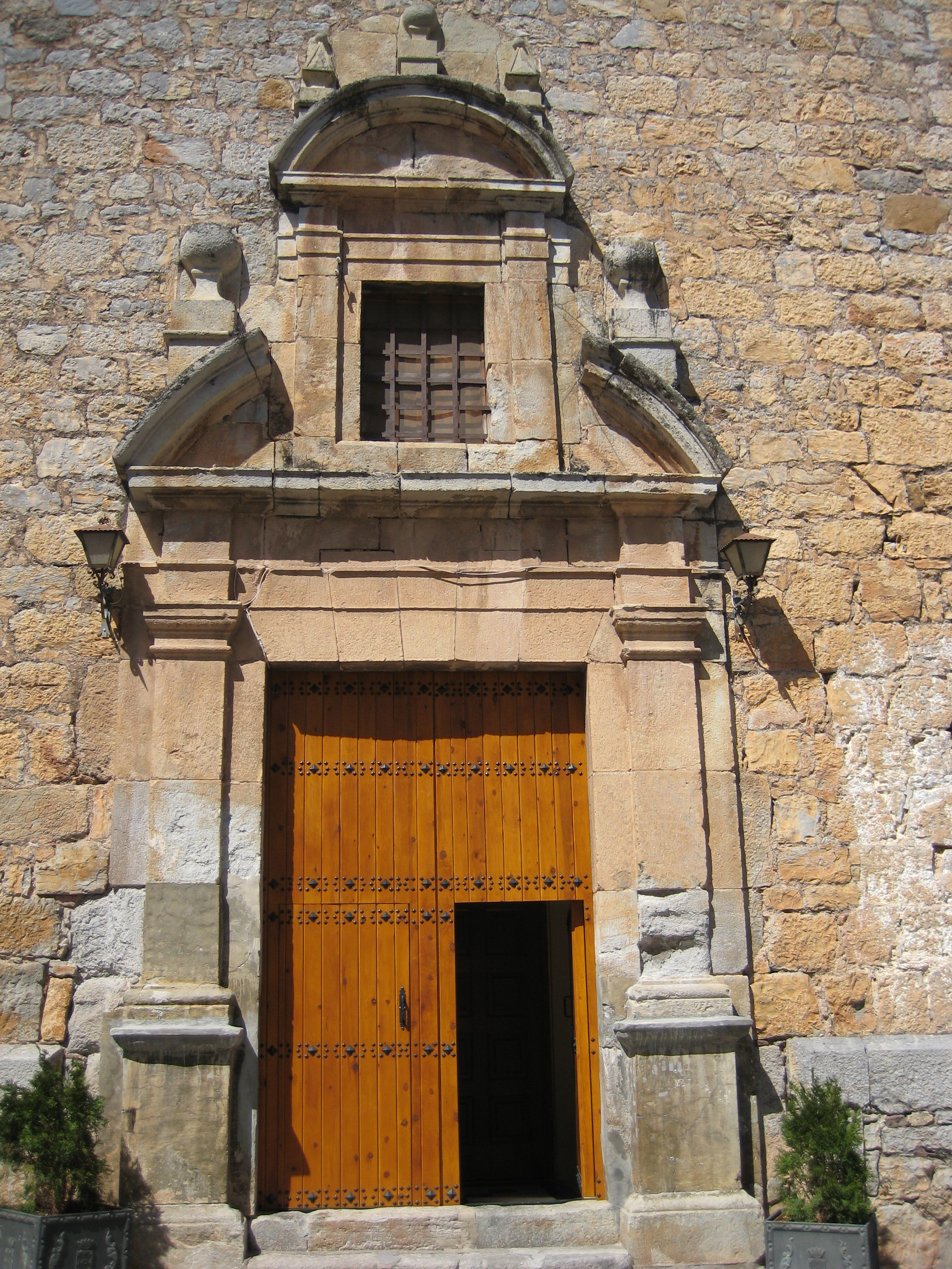 Portada de l'església de l'Alcúdia de Veo, Plana Baixa